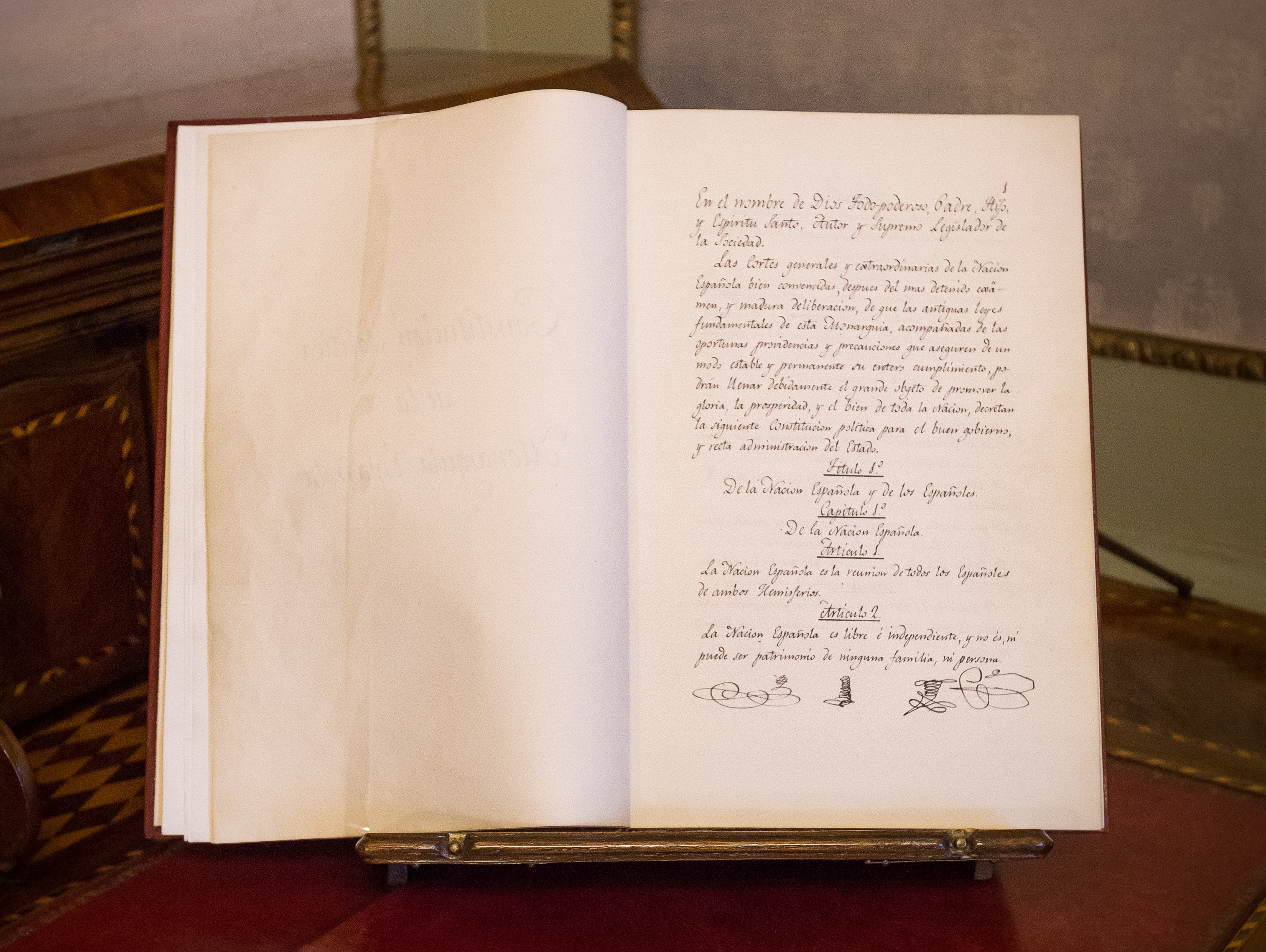 Ejemplar de la Constitución española de 1812, conocida popularmente como la Pepa, expuesto en el interior del Palacio del Senado de España.